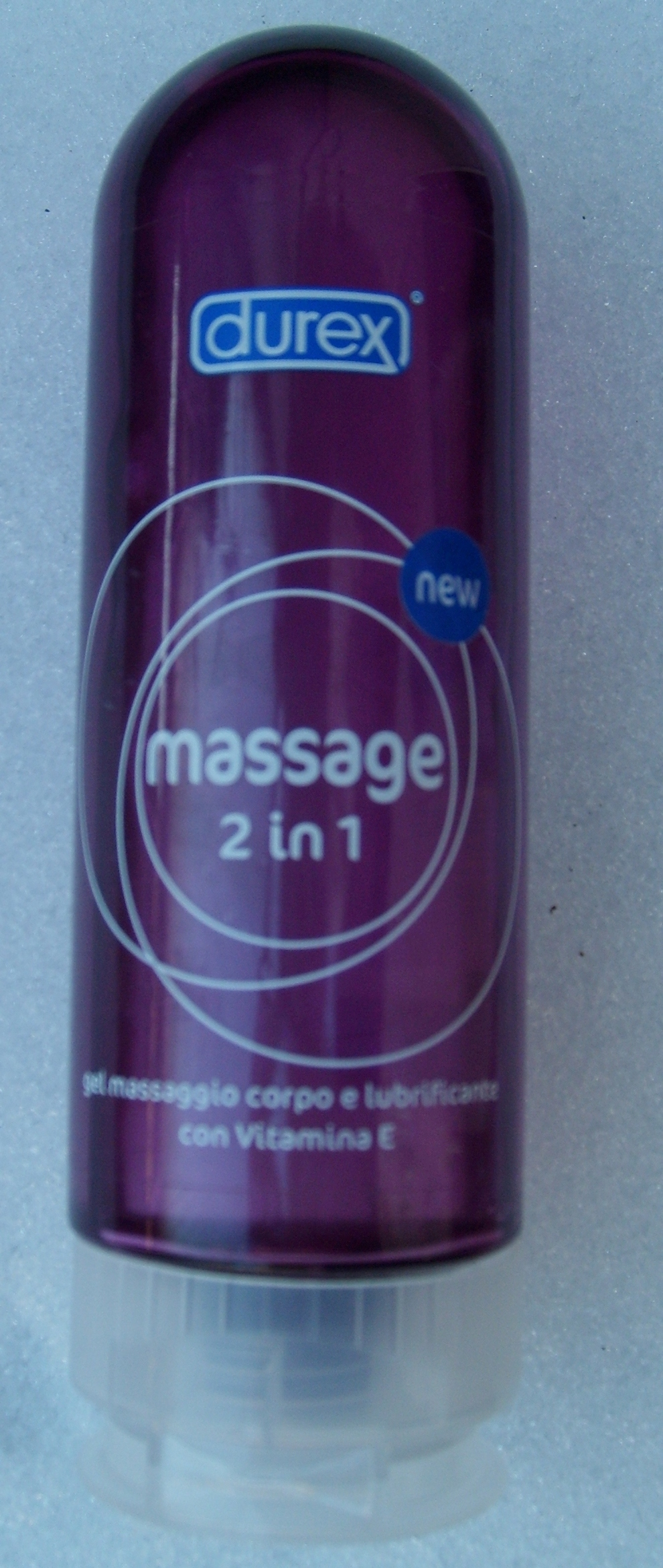 Lubrificante intimo e gel corpo Durex Massage 2in1